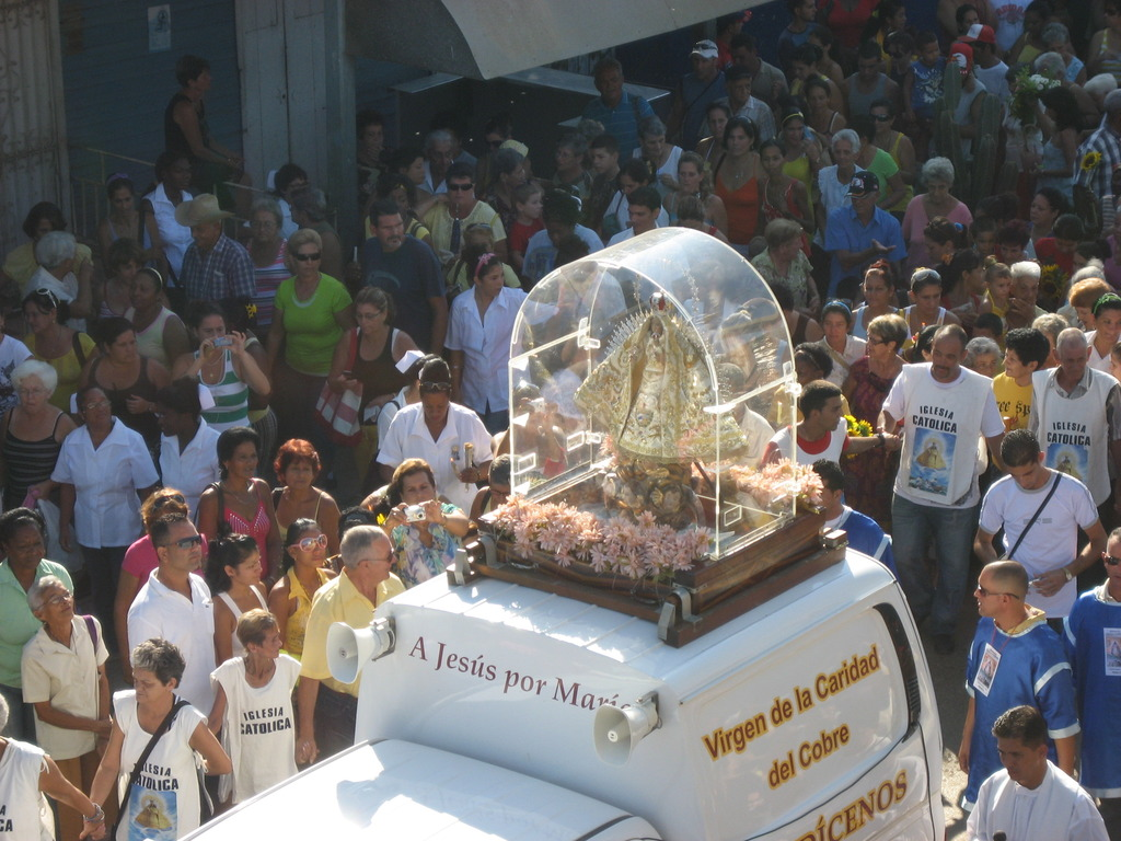 Virgen de la Caridad del Cobre a su paso por Melena del Sur - 2011